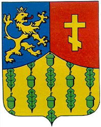 Herb miasteczka Białobożnica